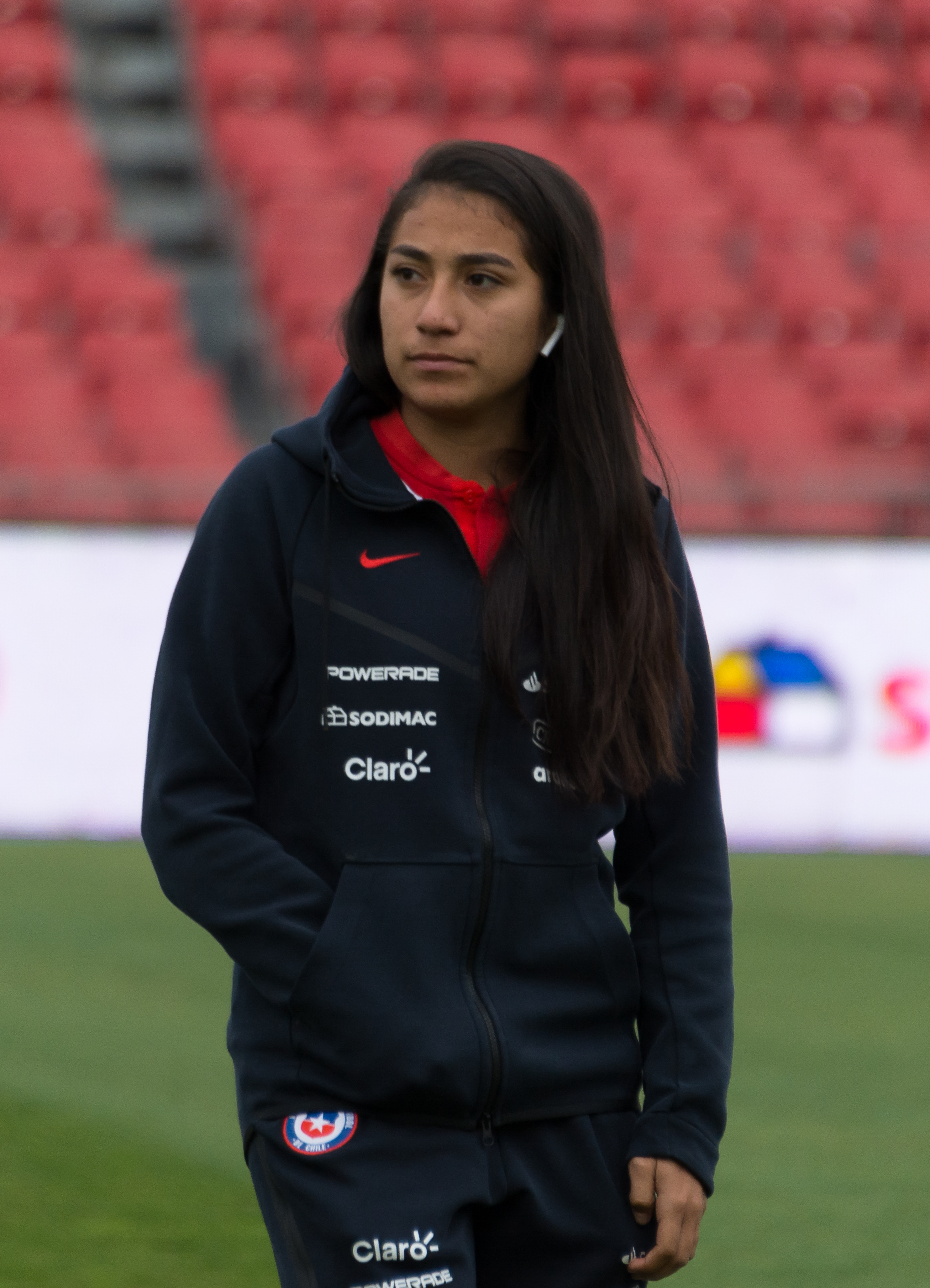 Ana Gutiérrez, Chile v Colombia, Estadio Nacional, Ñuñoa, Santiago, Chile.